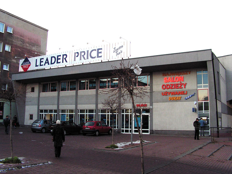 Dawny budynek kina "Relax" w Częstochowie, obecnie market Leader Price.